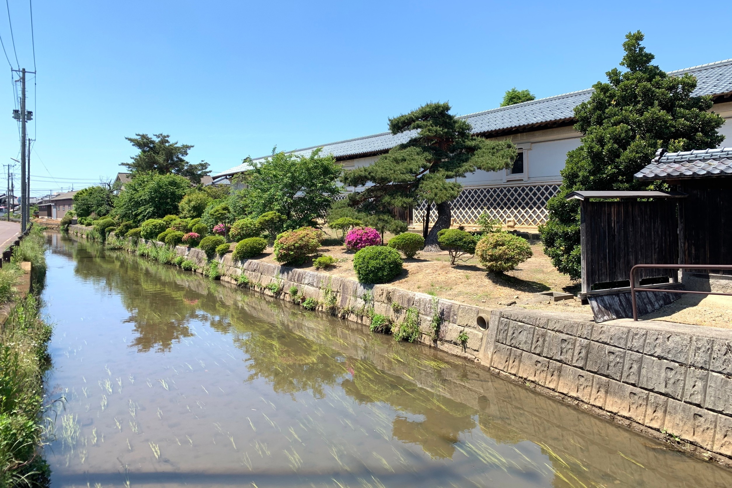 水原・無為信寺向かいにある旧佐藤家米蔵と駒林川（阿賀野市，2020年5月．公道から撮影）